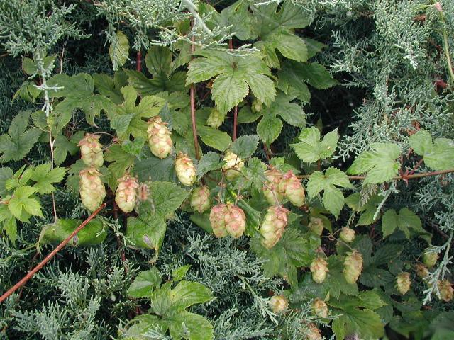 Humulus lupulus